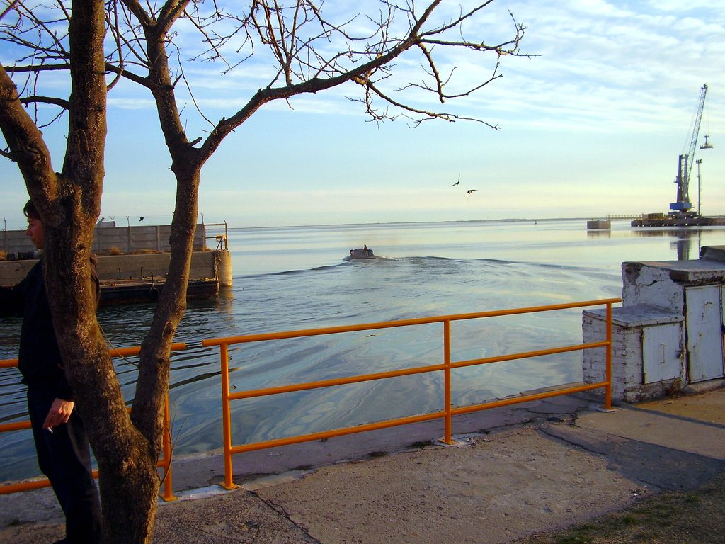 Puerto de Ingeniero White